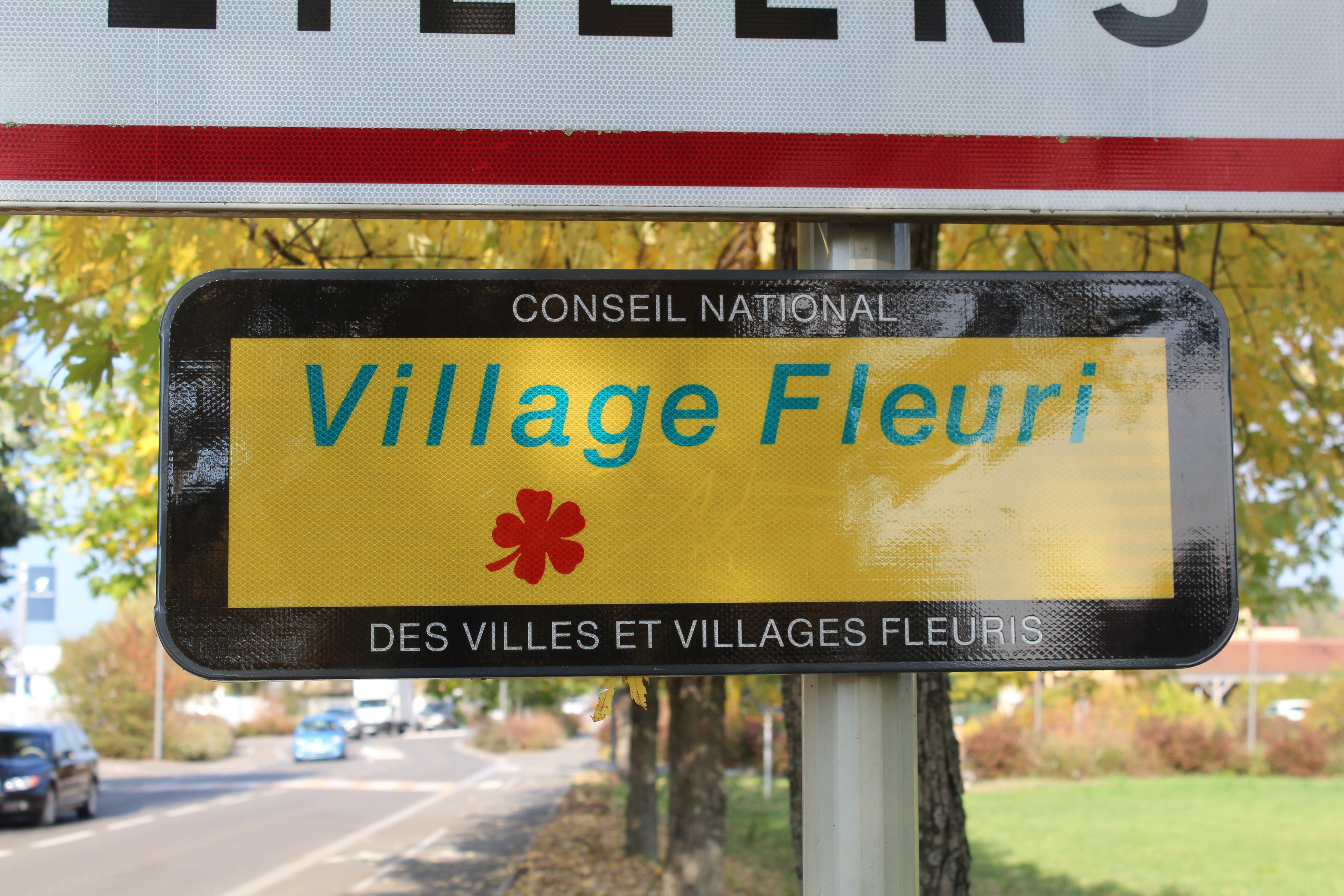 Panneau Village Fleuri avec la fleur à Feillens.